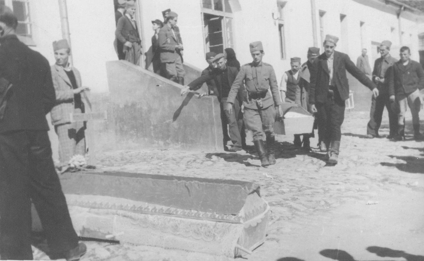 Srpskohrvatski / српскохрватски: Sahrana poginulih partizana u Gornjem Milanovcu, početkom oktobra 1941.